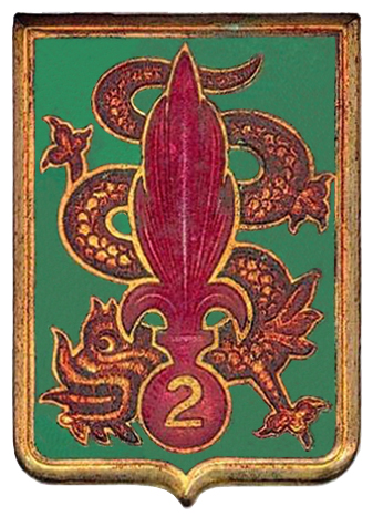 Insigne du 2e régiment étranger d'infanterie - type 1